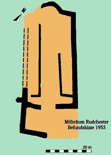 Befundskizze des römischen Mithräums von Rudchester/Vindobala, Stand 1953.